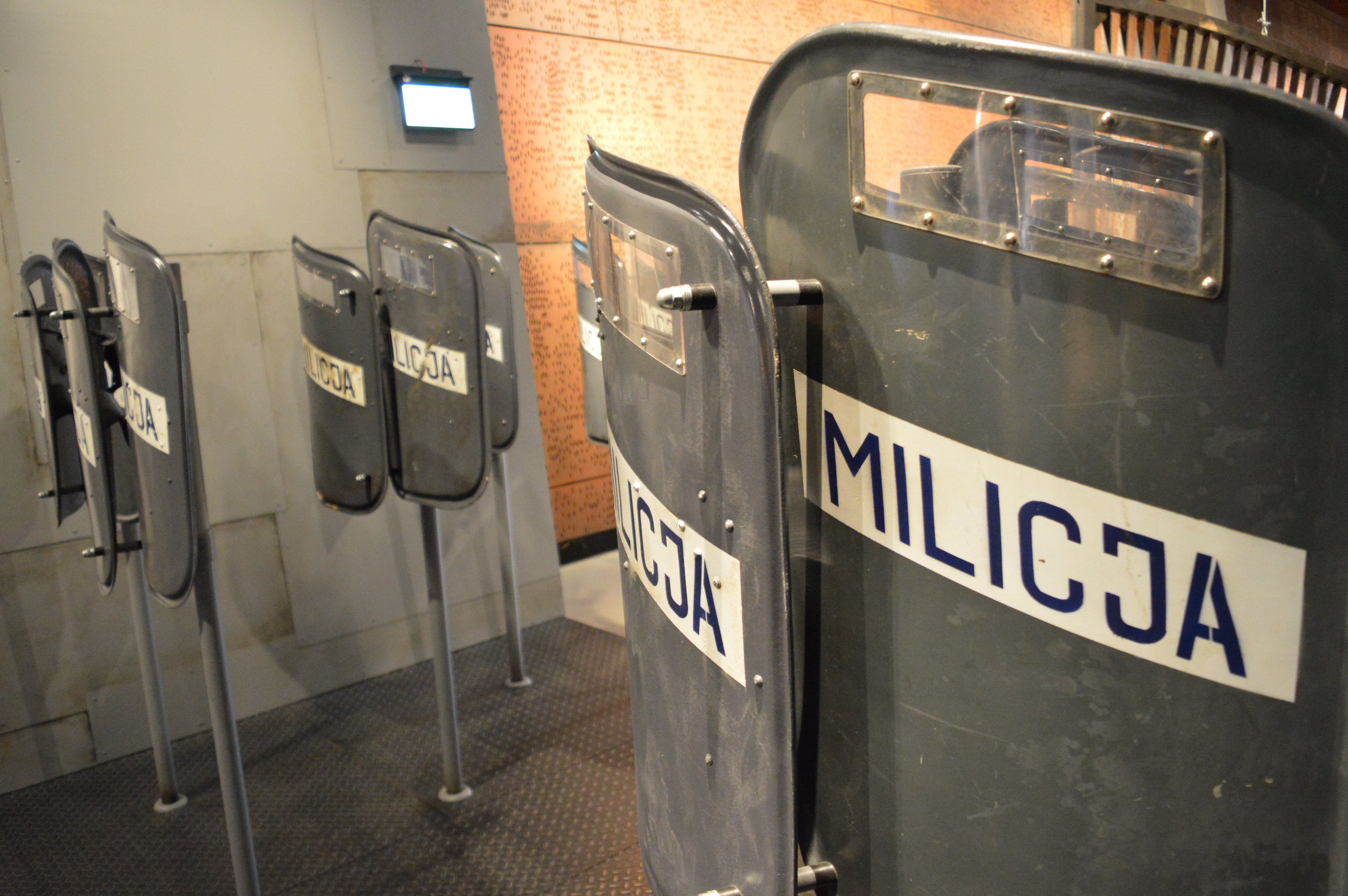 Europejskie Centrum Solidarności - sala D, szpalery tarcz Milicji Obywatelskiej